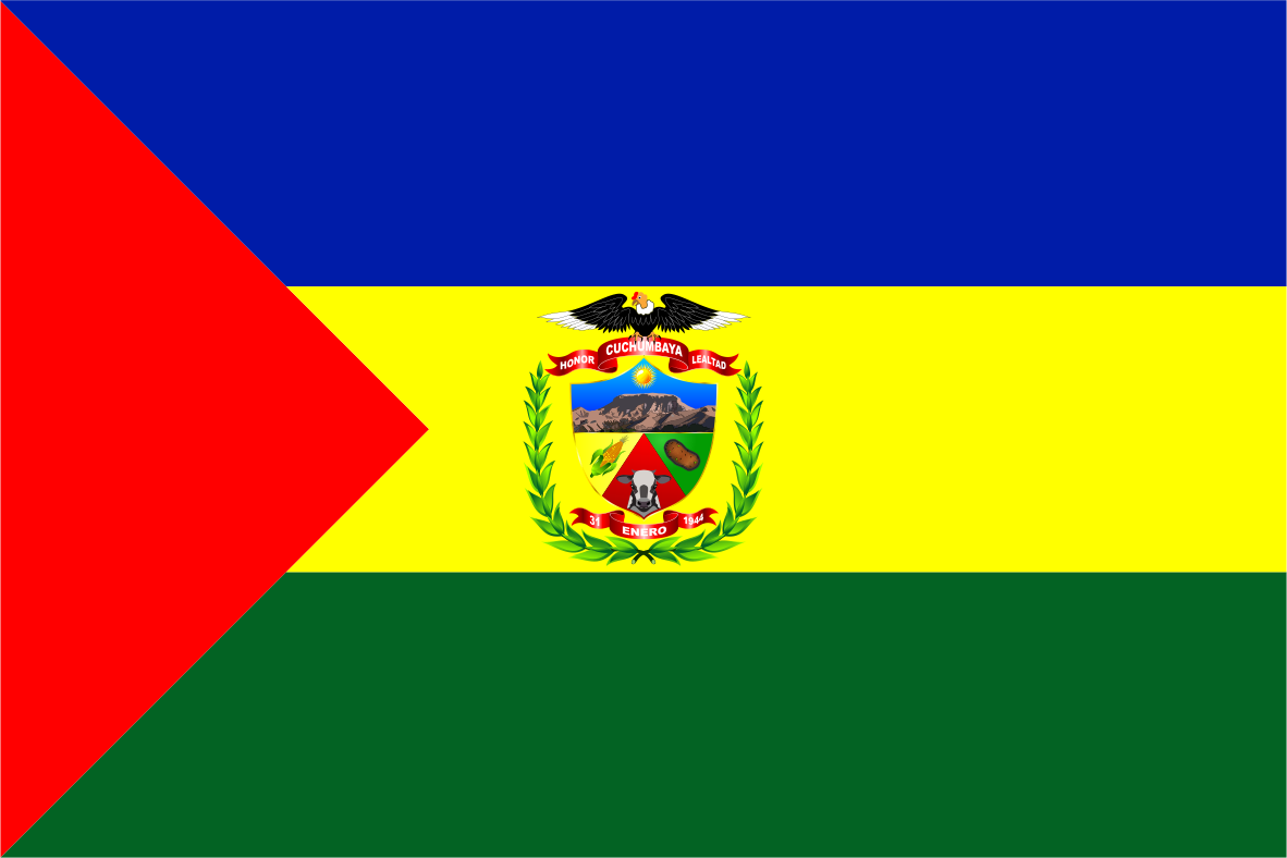 Bandera del Distrito de Cuchumbaya - Provincia de Mariscal Nieto - Región Moquegua